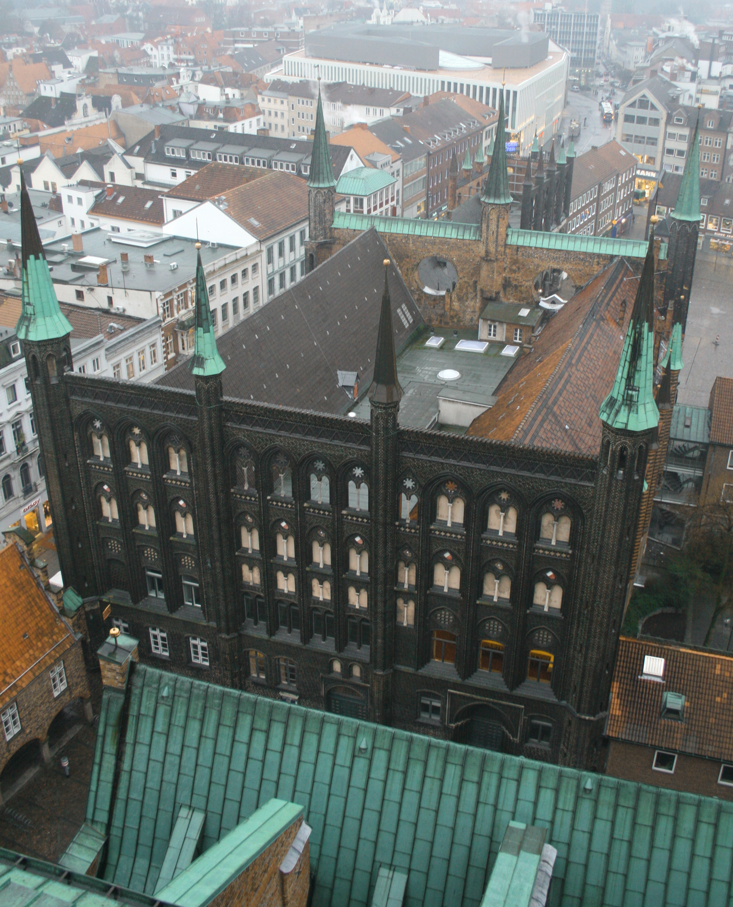 Lübecker Rathaus vom Dach der Marienkirche aus gesehen